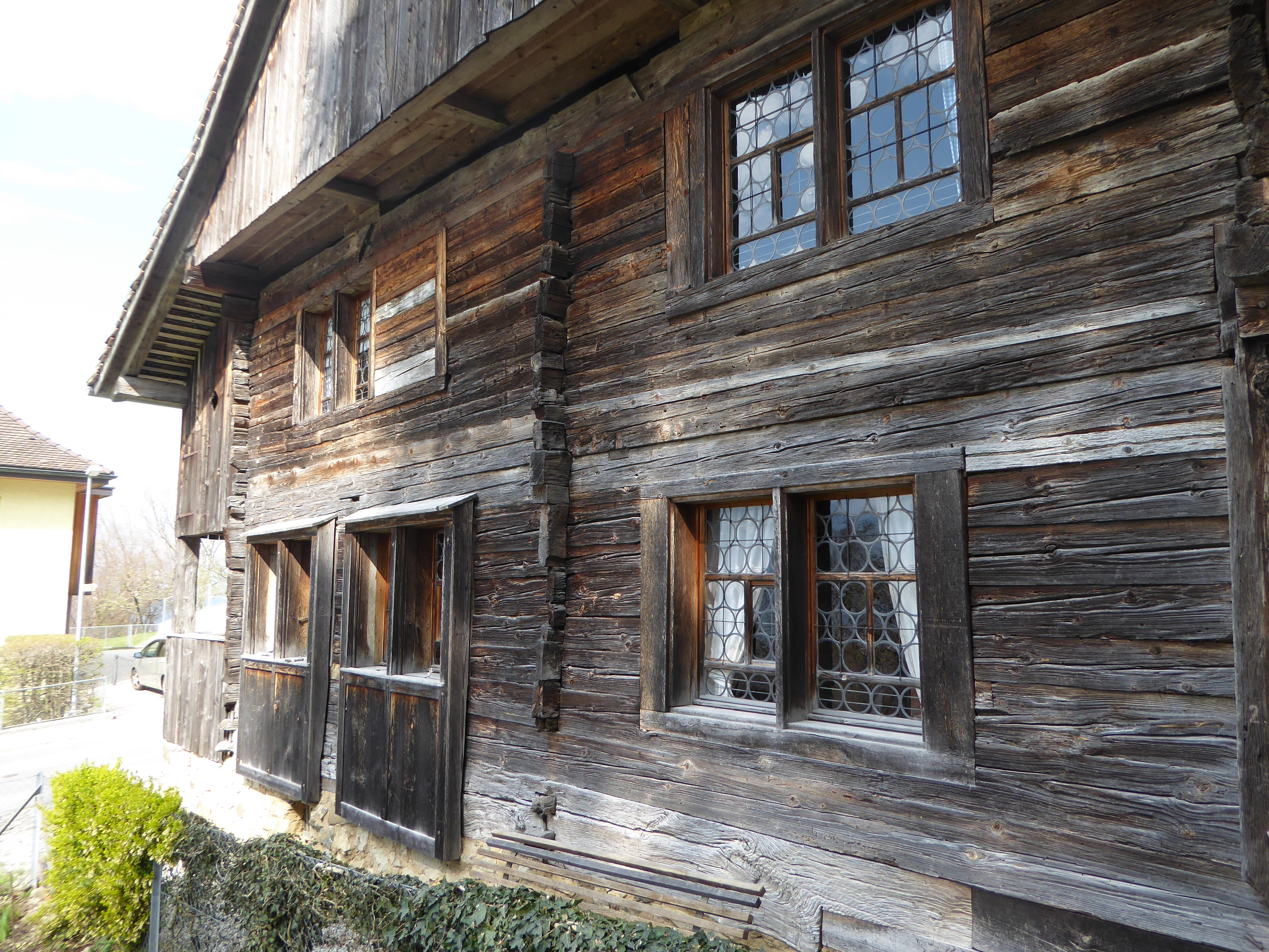 Biedermann-Haus Schellenberg: Fenster und Strickverbindungen